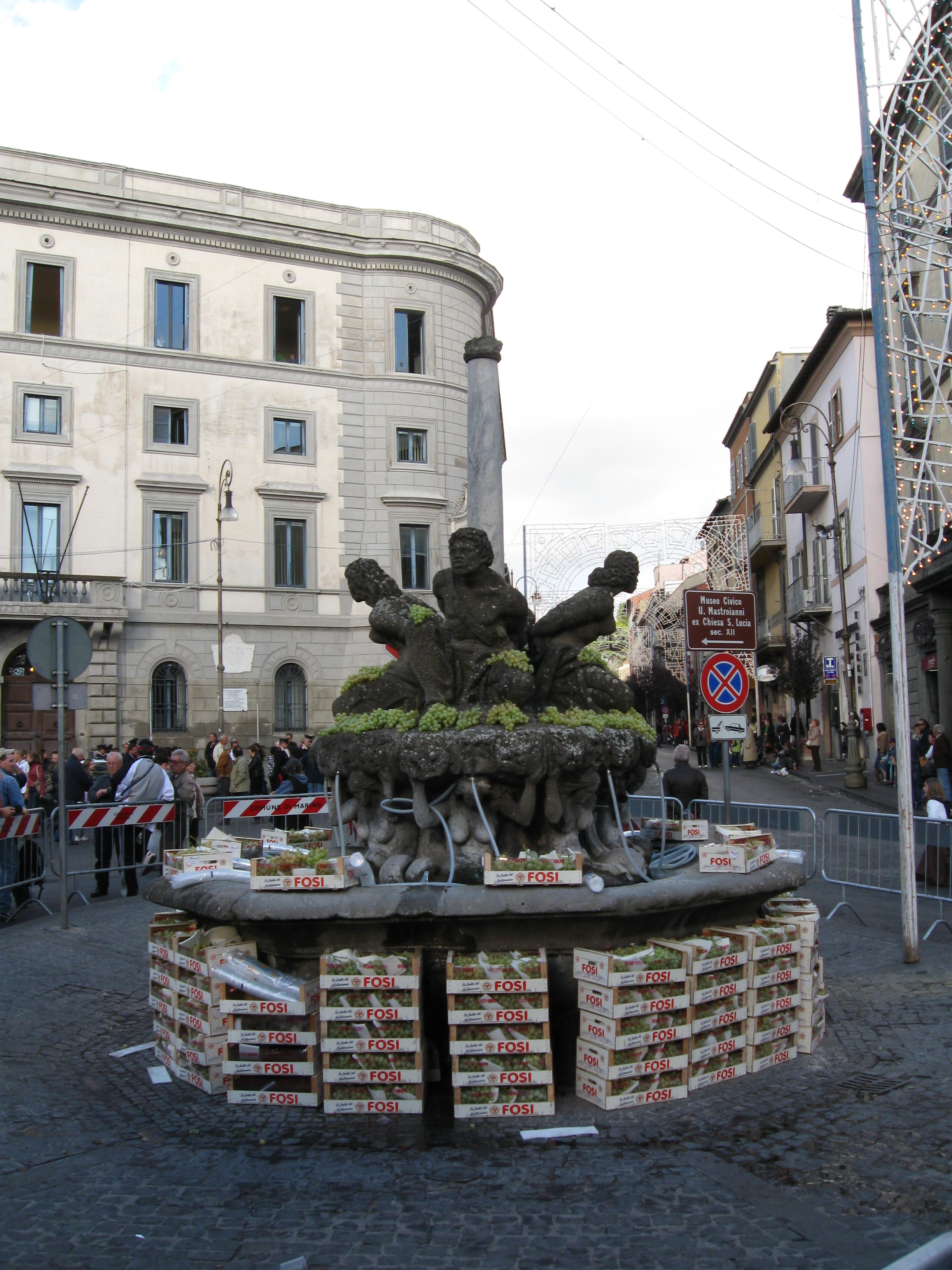 La fontana dei Quattro Mori prima del "miracolo delle fontane che danno vino" alla Sagra dell'Uva di Marino (RM) (5 ottobre 2008)